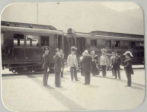 Proslava ob otvoritvi Bohinjske železnice leta 1906.